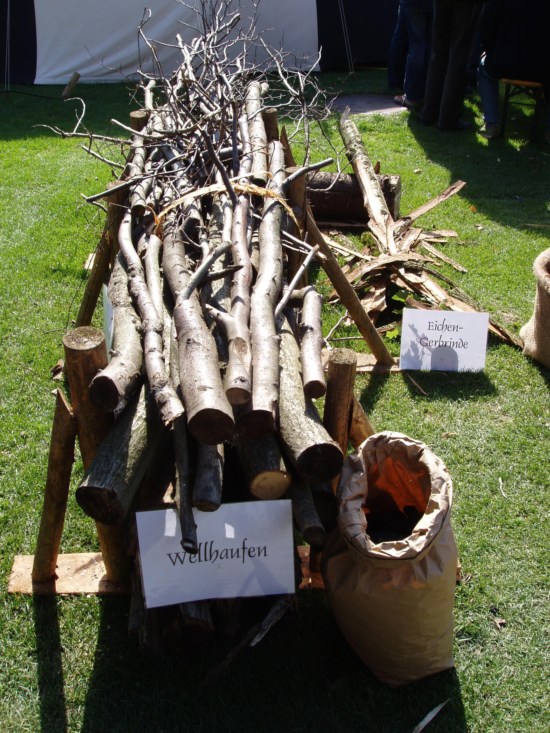 Wellhaufen (Zuordnungseinheit von Brennholz ca. 10m)